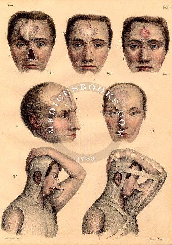 ринопластика - итальянский способ